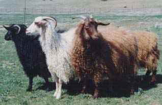 الیافت رنگی